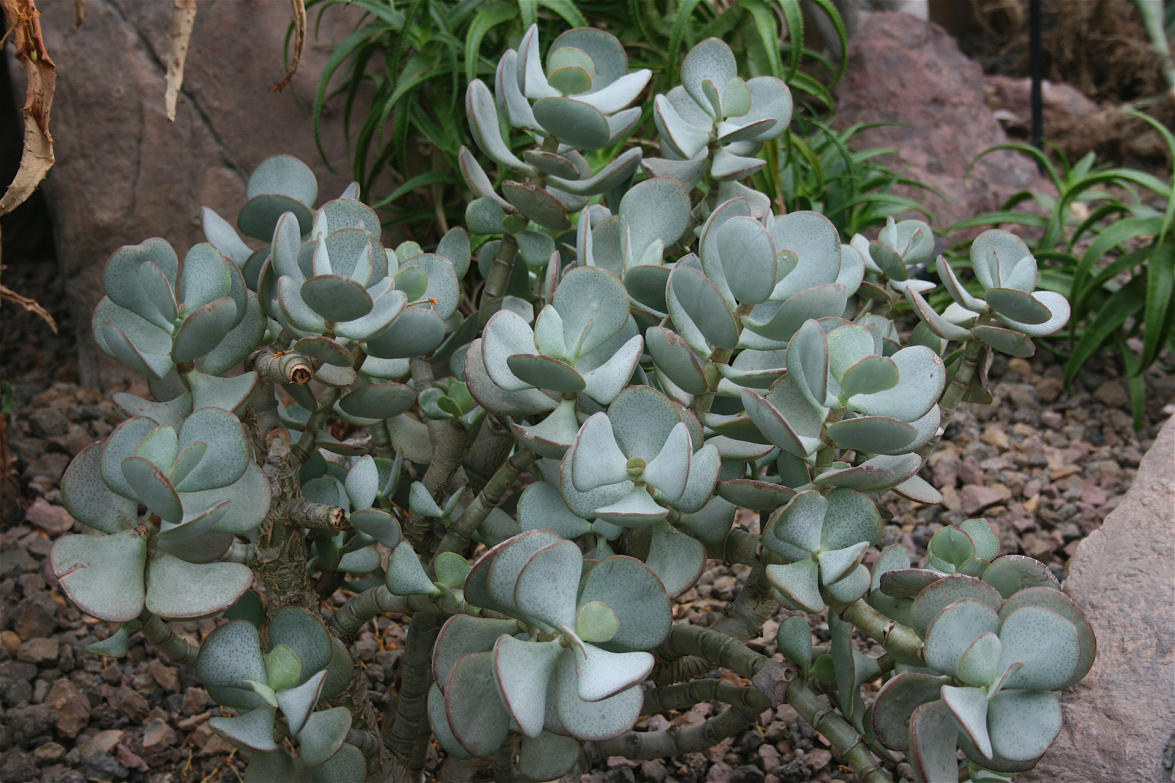 Cookie Tree Jade (Crassula arborescens) at Frederik Meijer Gardens & Sculpture Garden in Grand Rapids, MI.